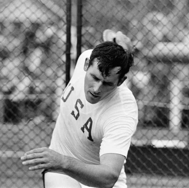 De Amerikaans discuswerper J. Silvester in actie op de Nenijtobaan in Rotterdam.